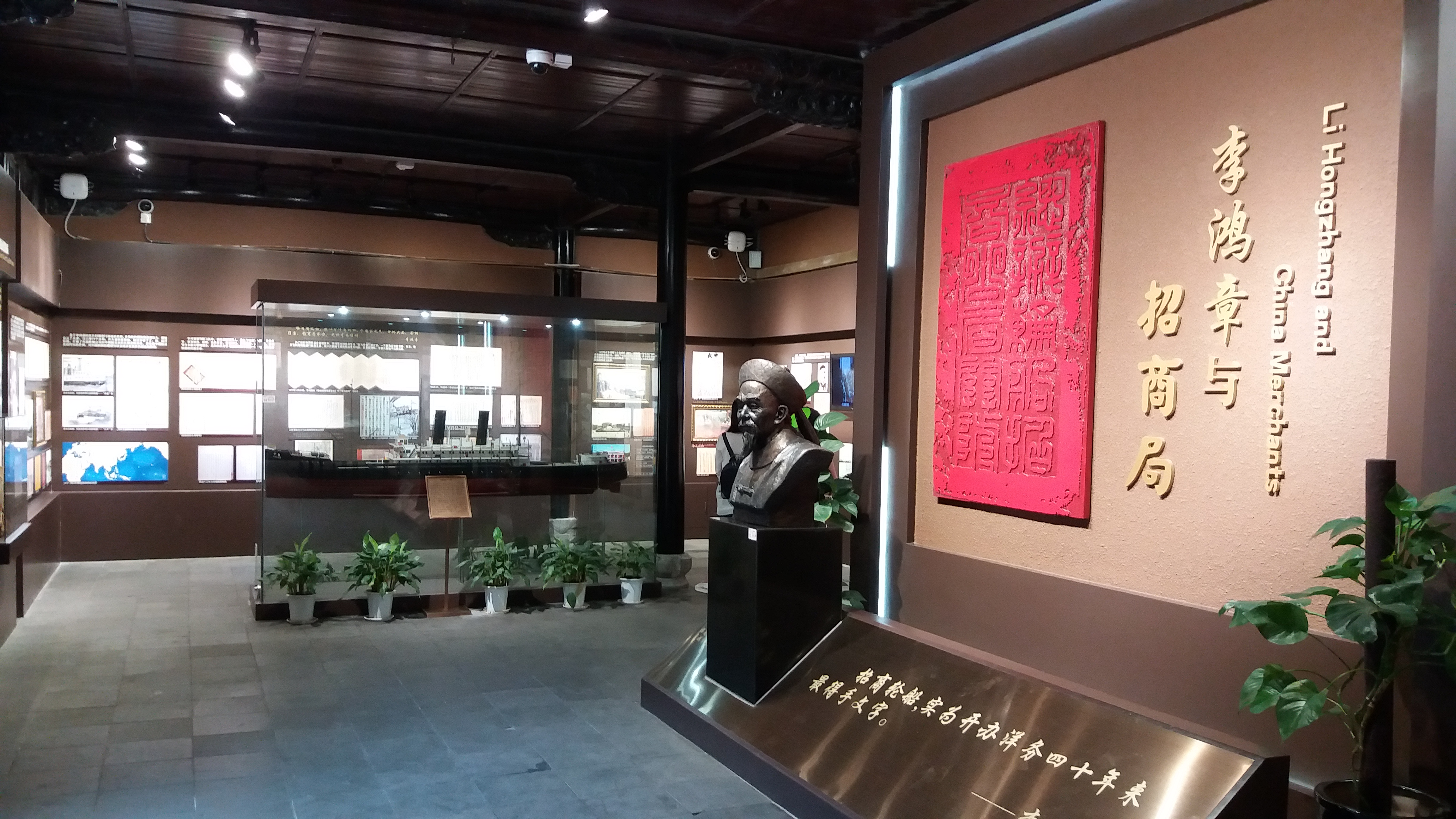 Former Residence of Li Hongzhang